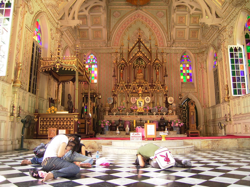 ภายในพระอุโบสถ วัดนิเวศธรรมประวัติราชวรวิหาร สัญญาอนุญาต The present photo is taken or owned by Thanyakij. The camera used was: Ricoh Caplio GX. หมวดหมู่:วัดนิเวศธรรมประวัติราชวรวิหาร หมวดหมู่:ภาพสถานที่ ในจังหวัดพระนครศรีอยุธยา